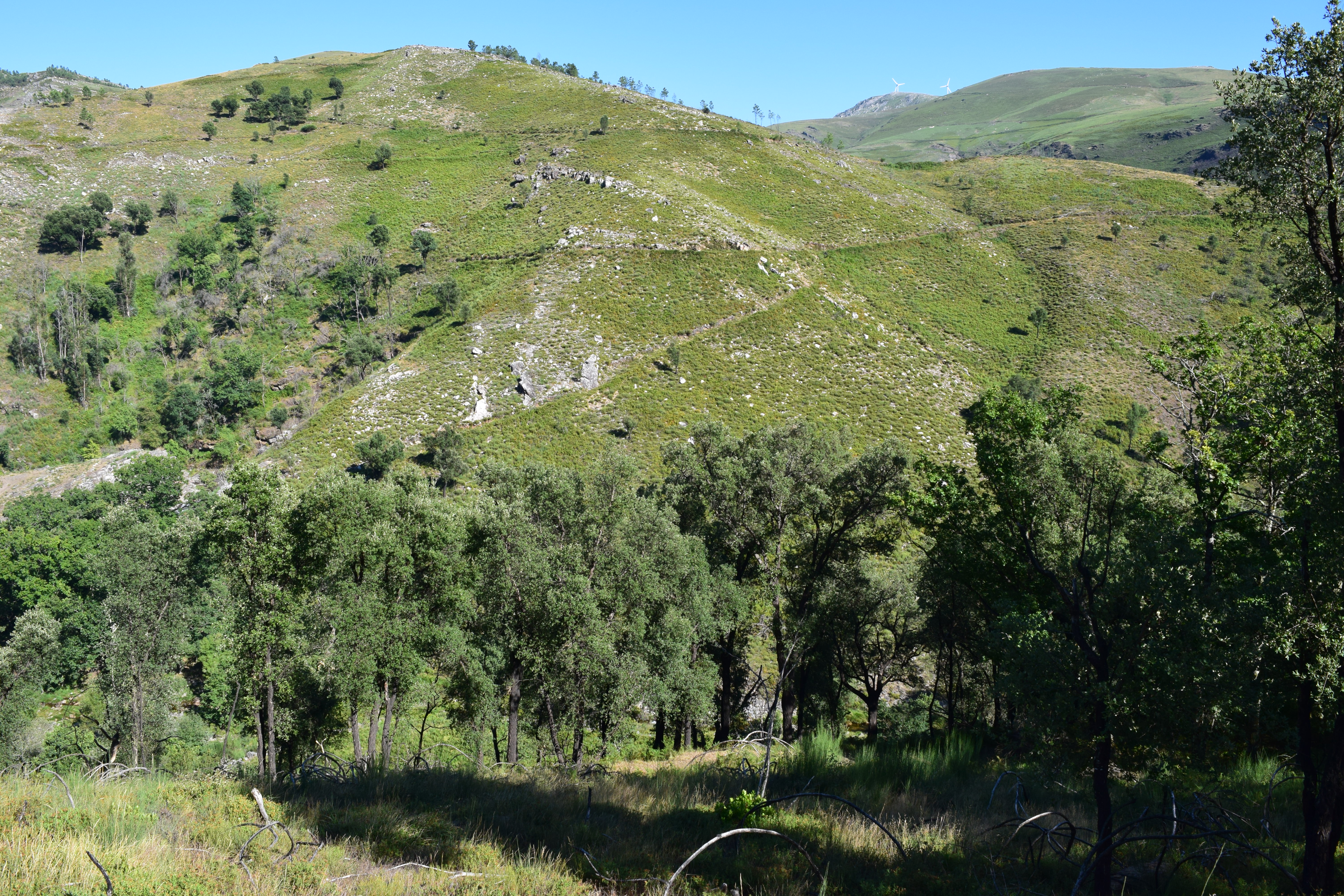 Parque Natural do Alvão 5 This is a photography of a Site of Community Importance in Portugal with the ID: PTCON0003. Natura2000 entry, EEA entry